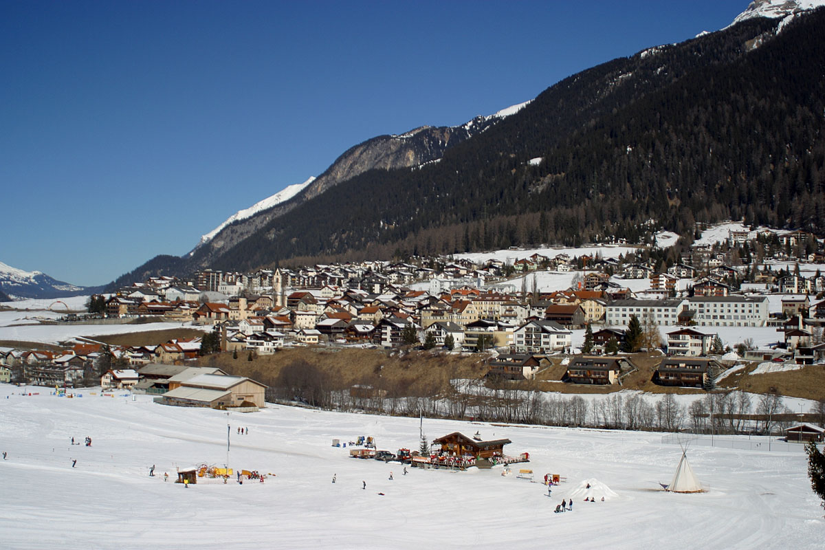 Ansicht von Savognin, aufgenommen von La Nars Rumantsch: Vista da Savognin, piglia se da La Nars